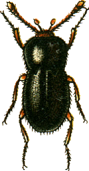 This file has been extracted from another file: Jacobs16.jpg